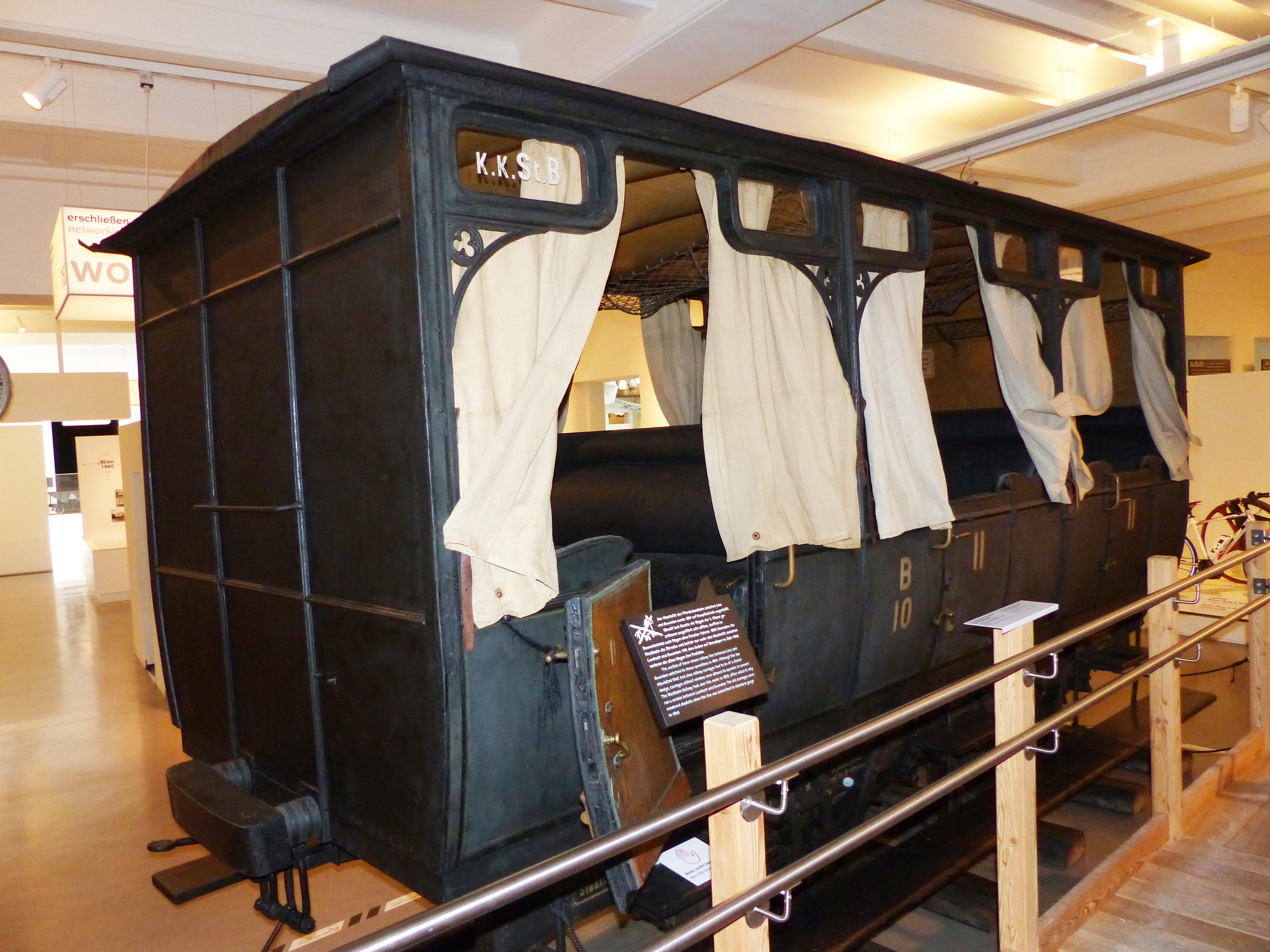 Personenwagen 2. Klasse für den Sommerbetrieb, 1855, Maschinen- und Waggonbaufabrik Johann Spiering Wien; Exponat im Technischen Museum Wien